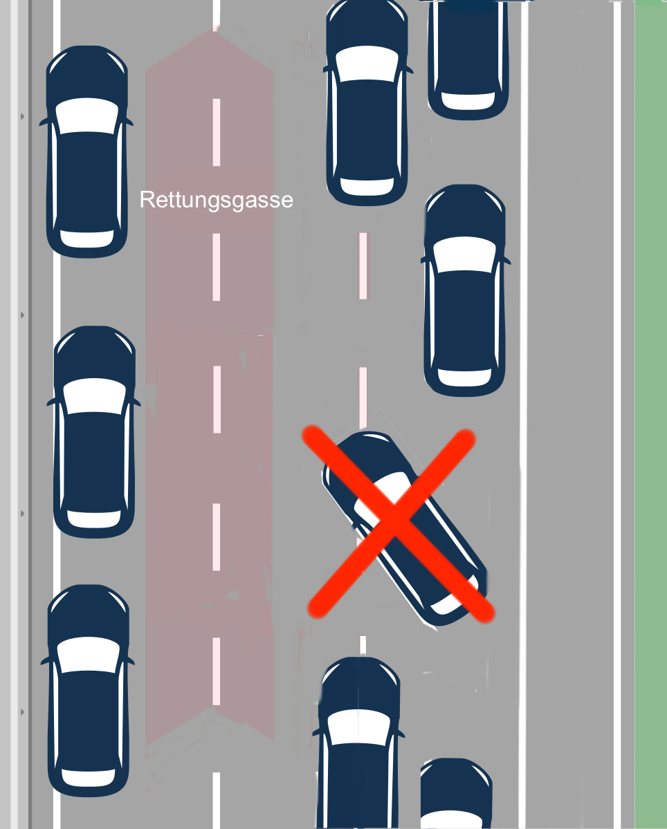 Spurenwechsler im Stau in Deutschland